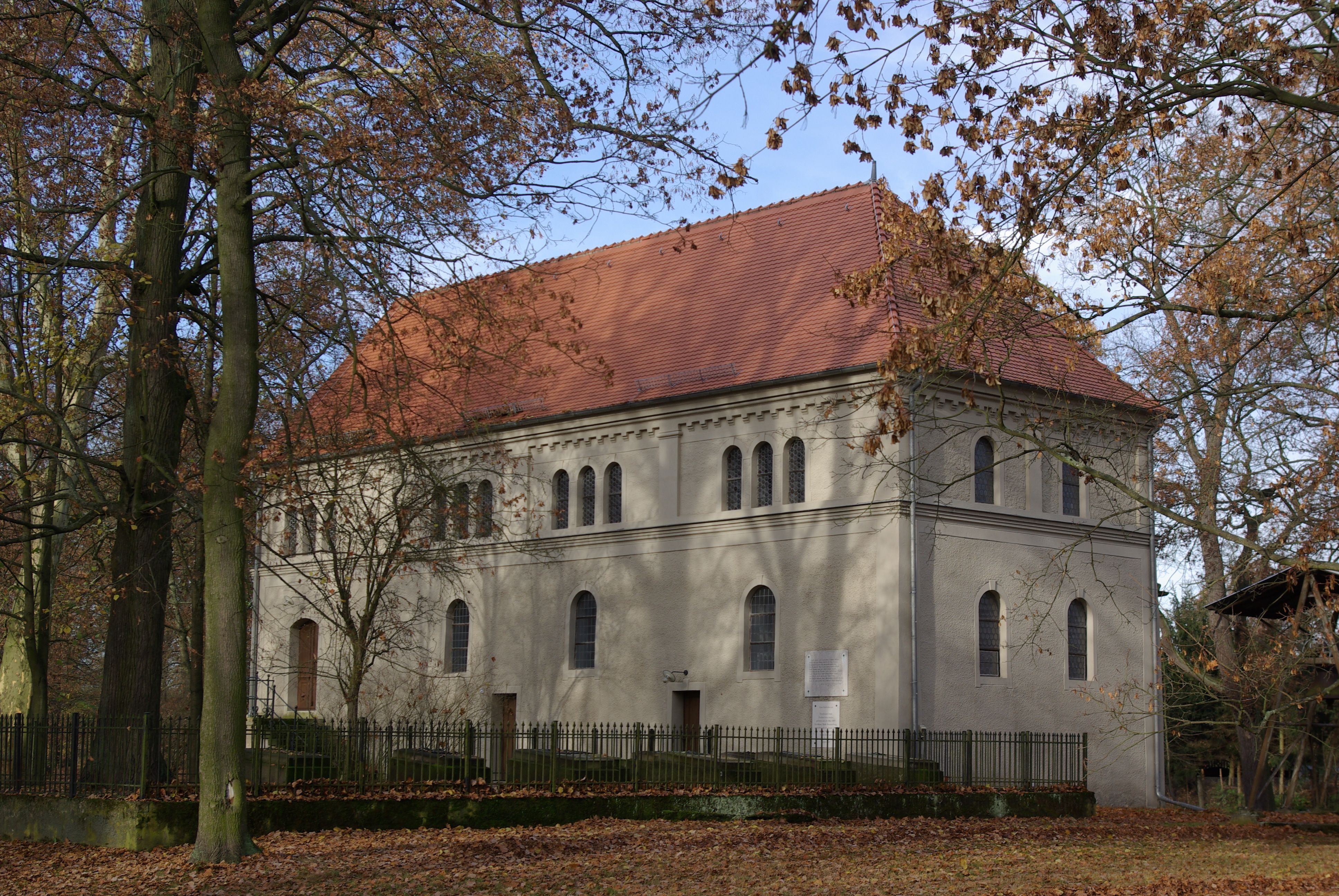 Nieder Fläming Ortsteil Wiepersdorf in Brandenburg. Die Kirche steht neben dem Schloss Wiepersdorf und steht unter Denkmalschutz.